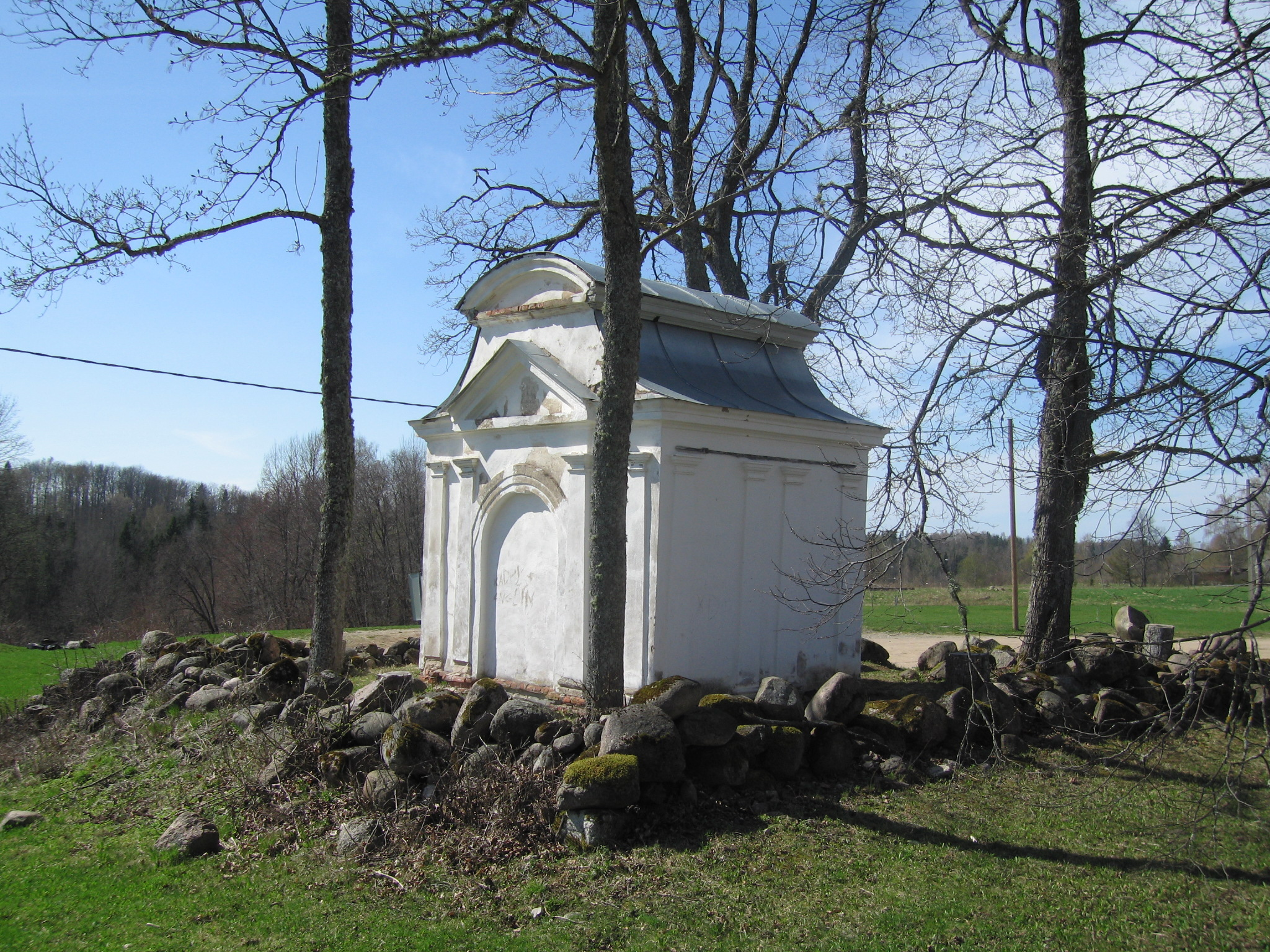 Matusekabel idavaade